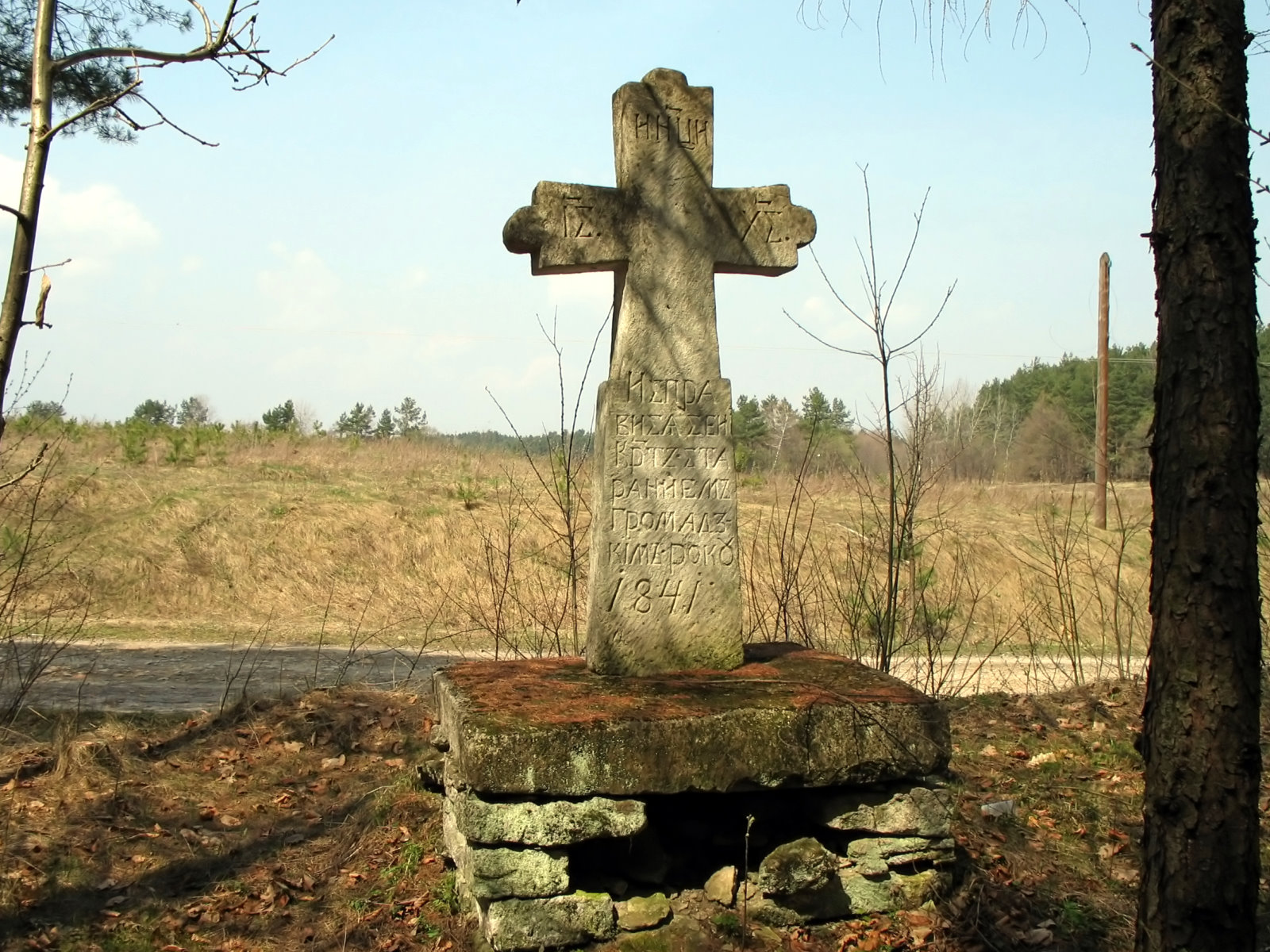 Polanka Horyniecka (Polska) - krzyż przydrożny z 1841 r.